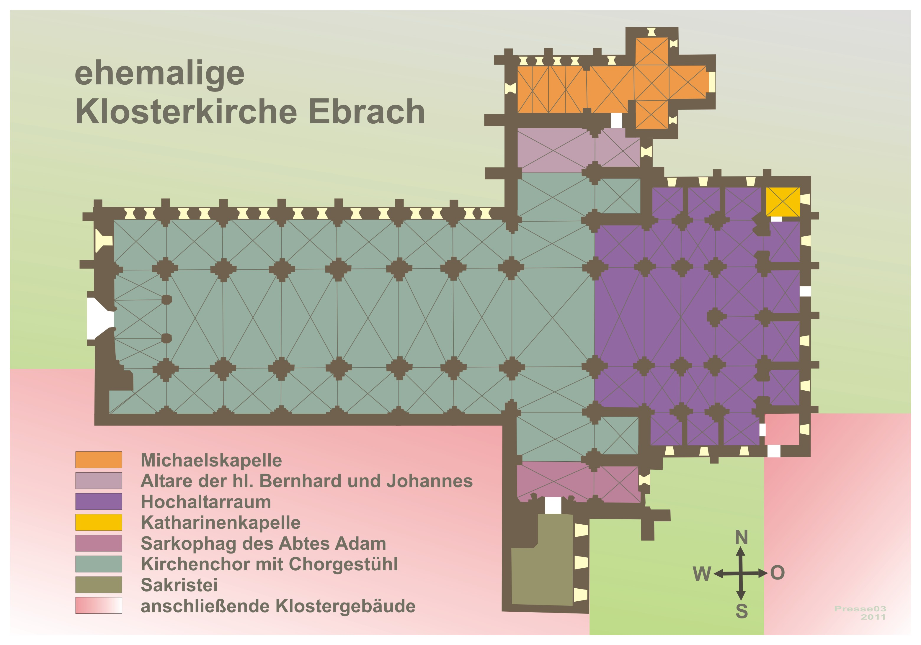 Grundriss der ehemaligen Klosterkirche Ebrach in Unterfranken, Bayern